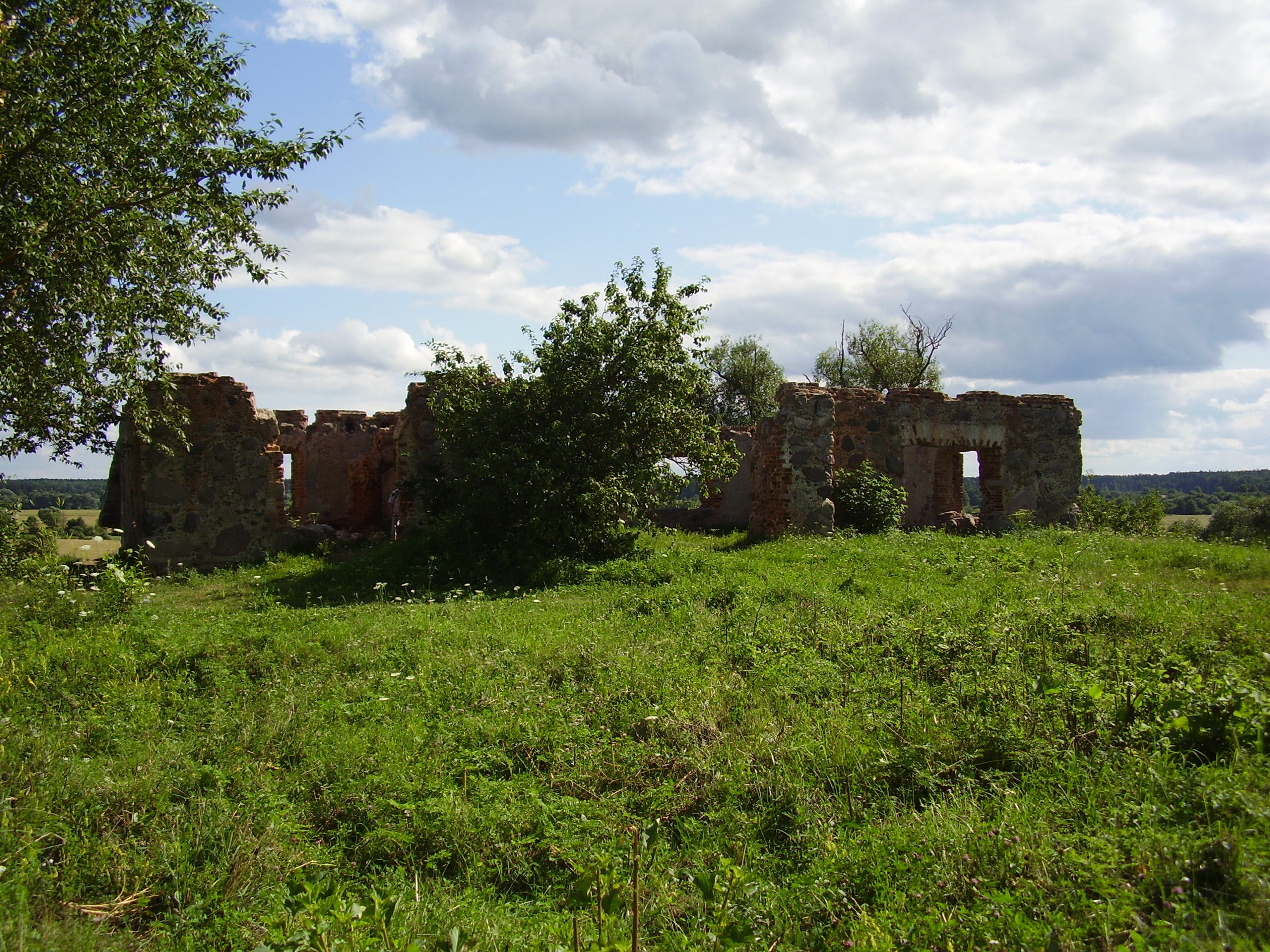 Беларуская (тарашкевіца): Гарадзішча. в. Свіслач This is a photo of Belarusian heritage monument. Reference number: 513В000588 ( WLM)